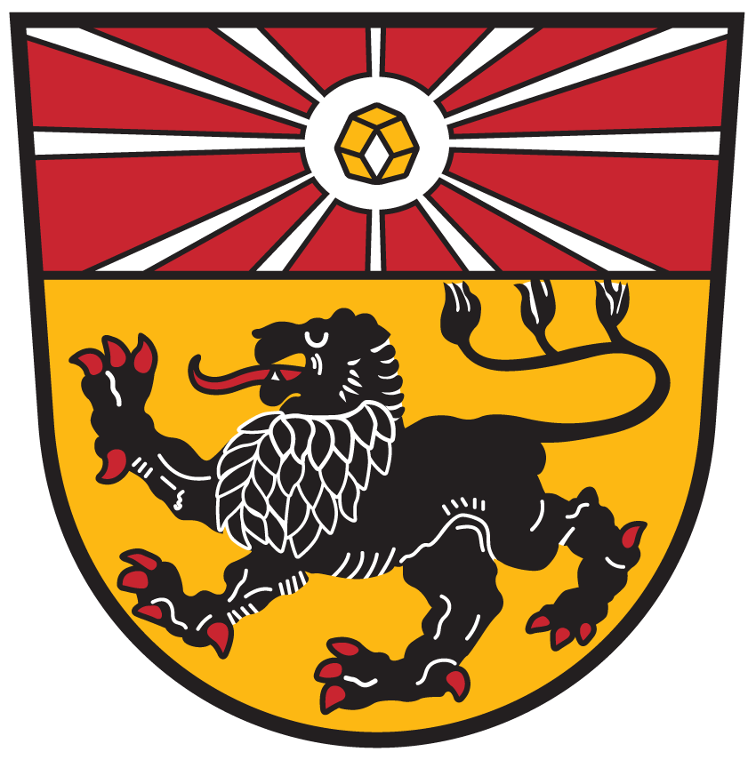 Wappen von Radenthein